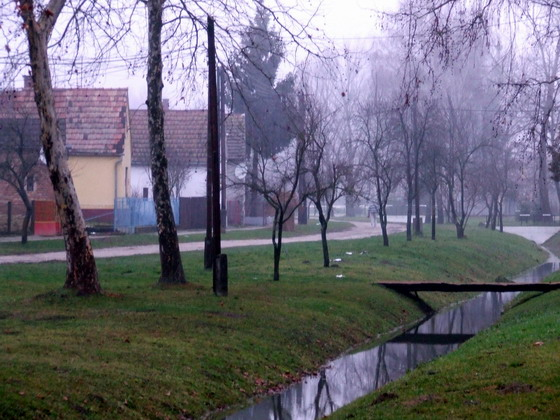 Utcarészlet Drávasztárán